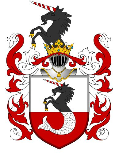 Rodový znak von Nimptsch.